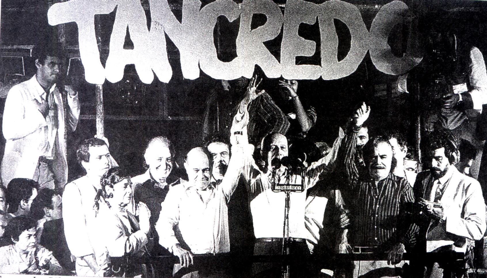 Campanha de Tancredo Neves a presidência da republica